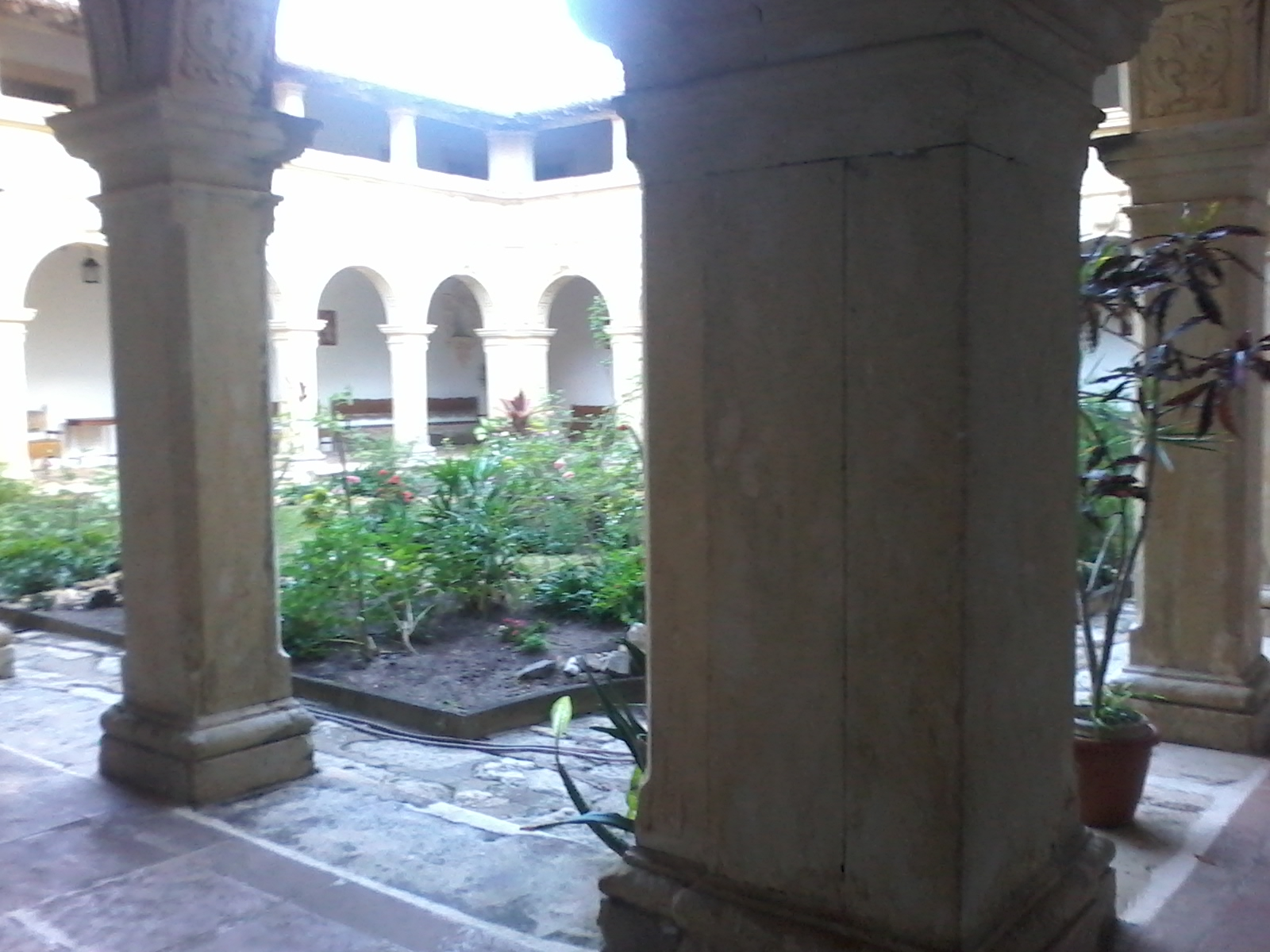 Interior do Convento da Igreja de São Franscisco